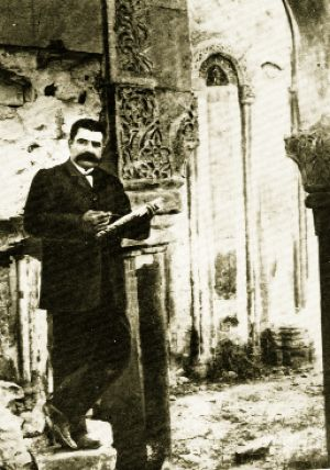 Թորոս Թորամանյանը Անիում 1907թ.